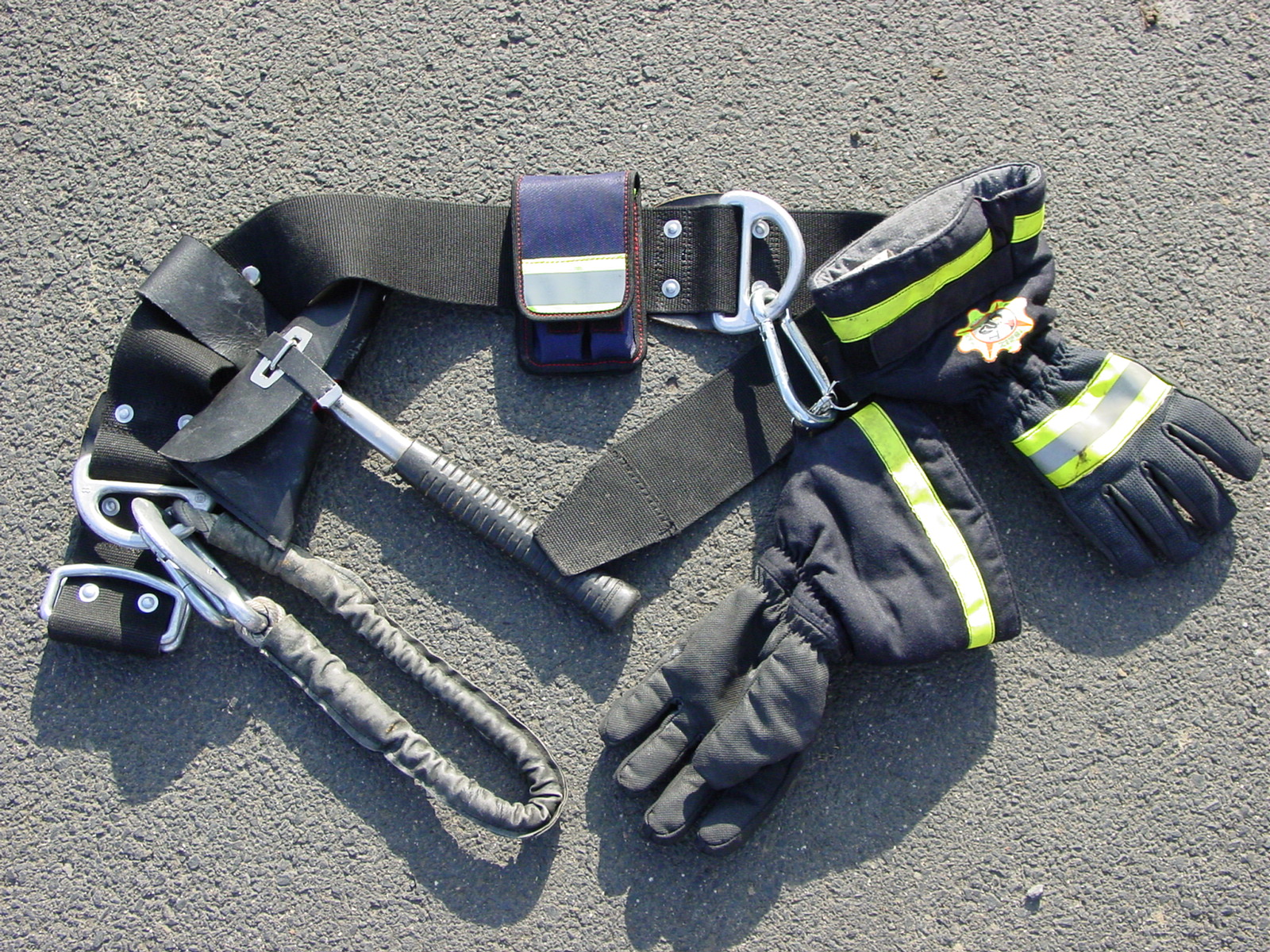 Feuerwehrsicherheitsgurt